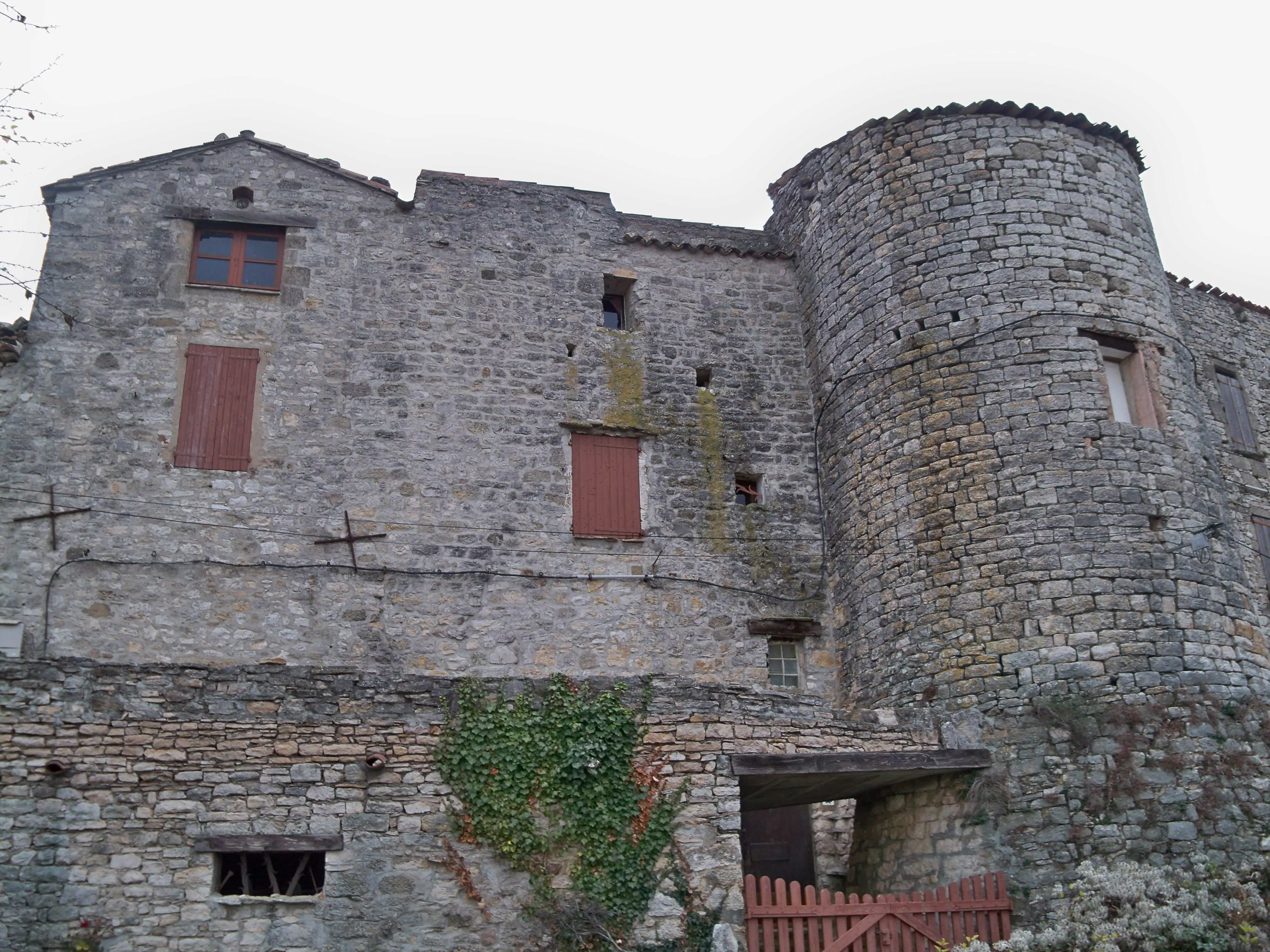 Tour à Vachères (04)